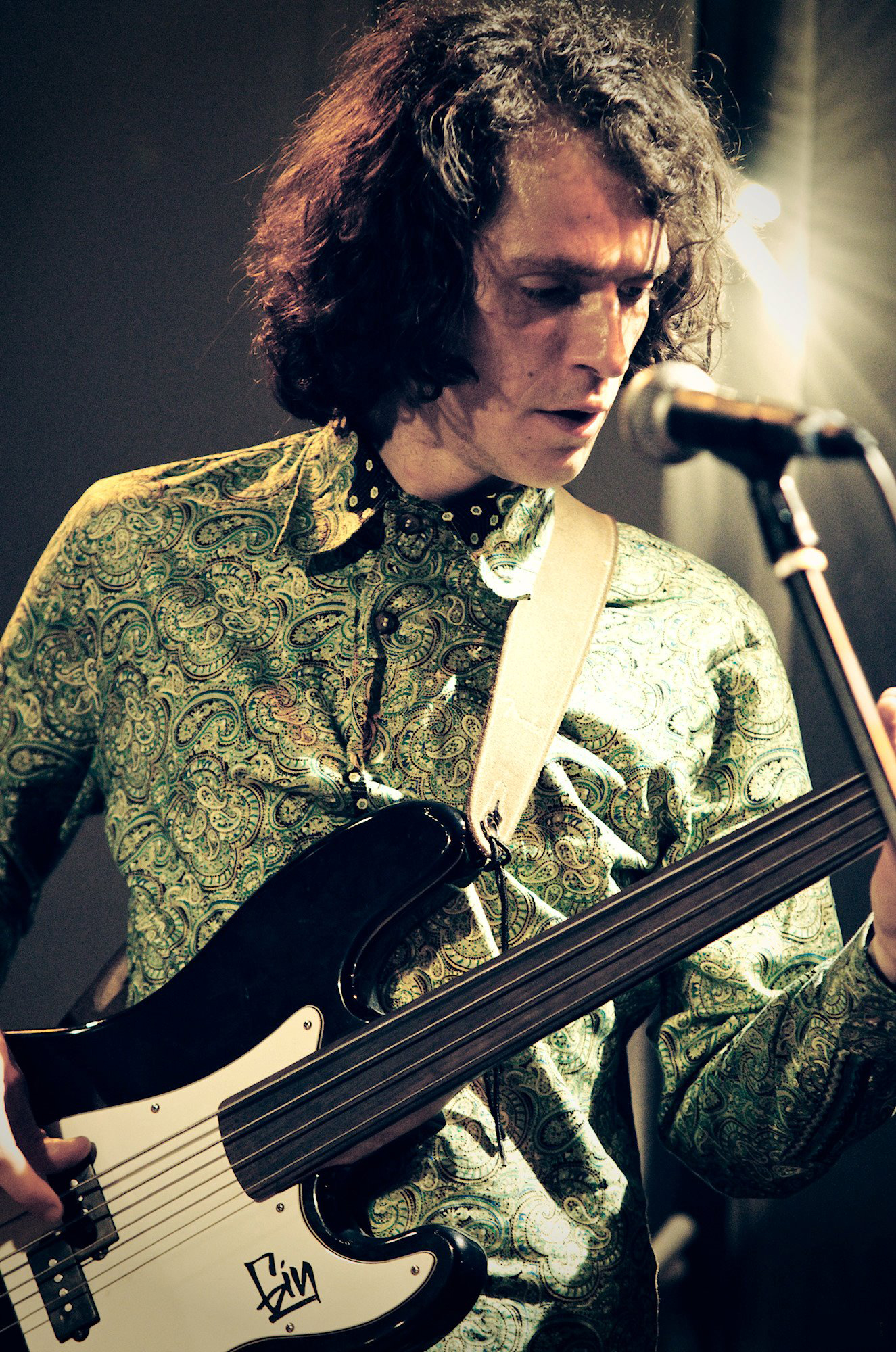 Robert Plaisancier am Bass.